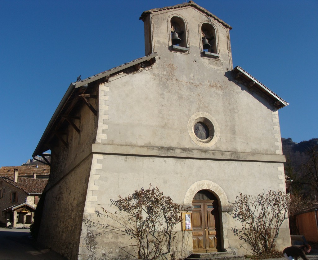 Le Saix (Hautes-Alpes) : façade de l'église, orientée vers l'ouest. Noter l'architecture du mur latéral nord, évoquant un contrefort.